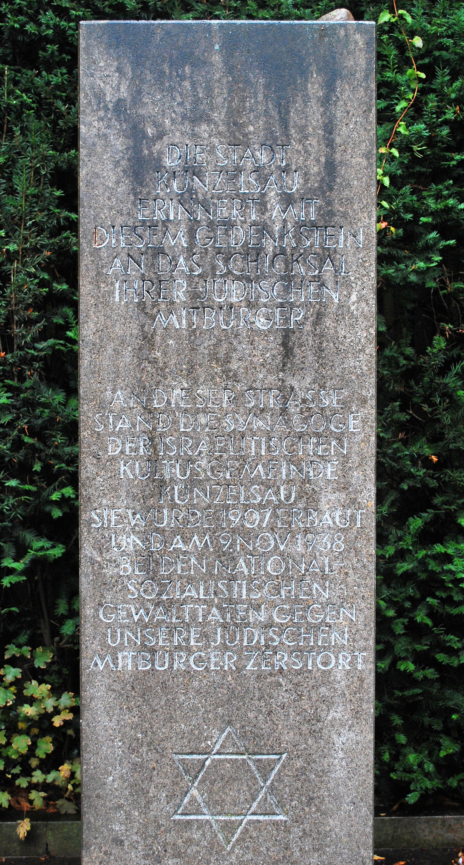 Gedenkstein an die 1938 zerstörte Synagoge in Künzelsau